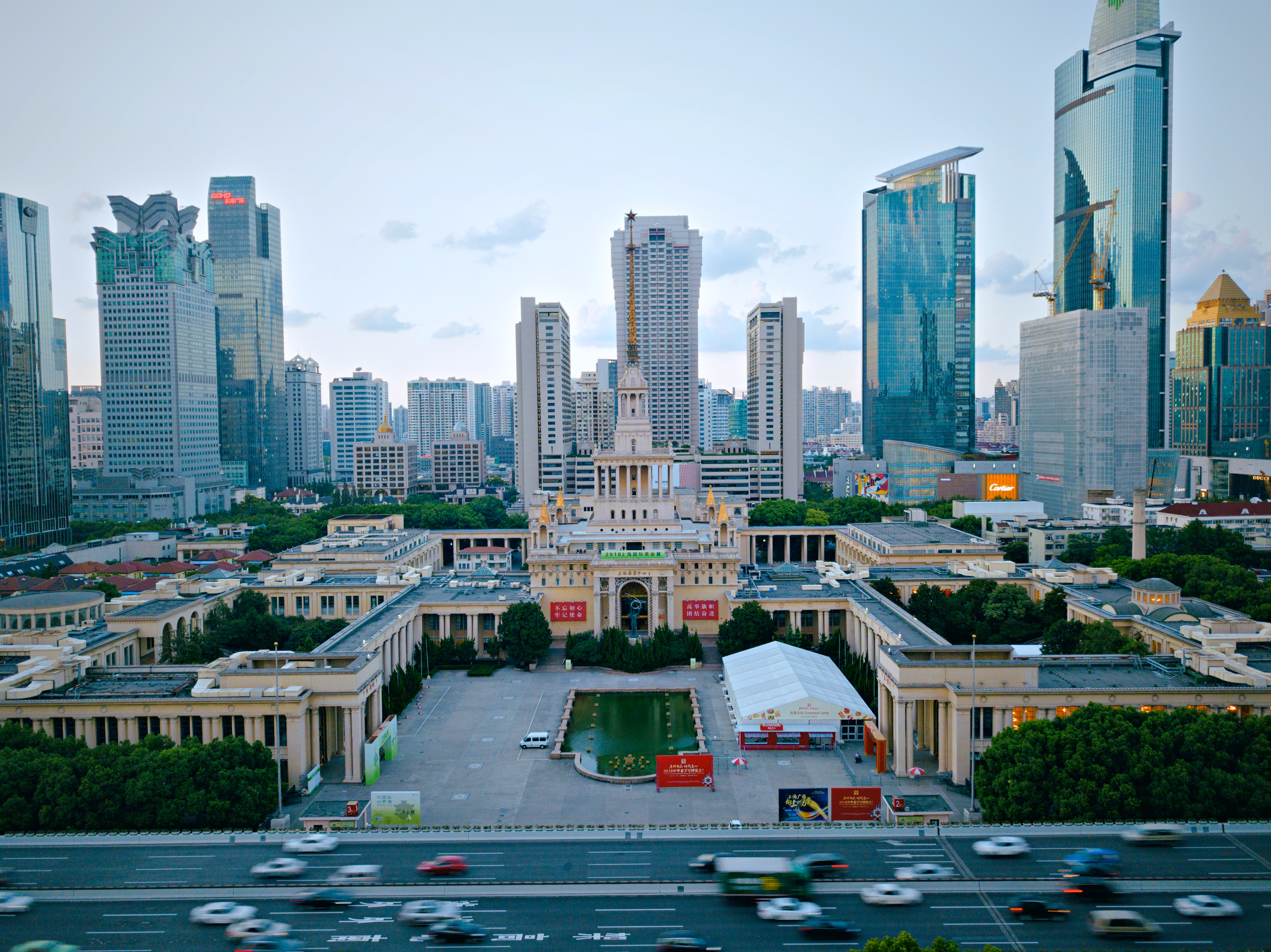 中文（中国大陆）: 上海展览中心，俯拍